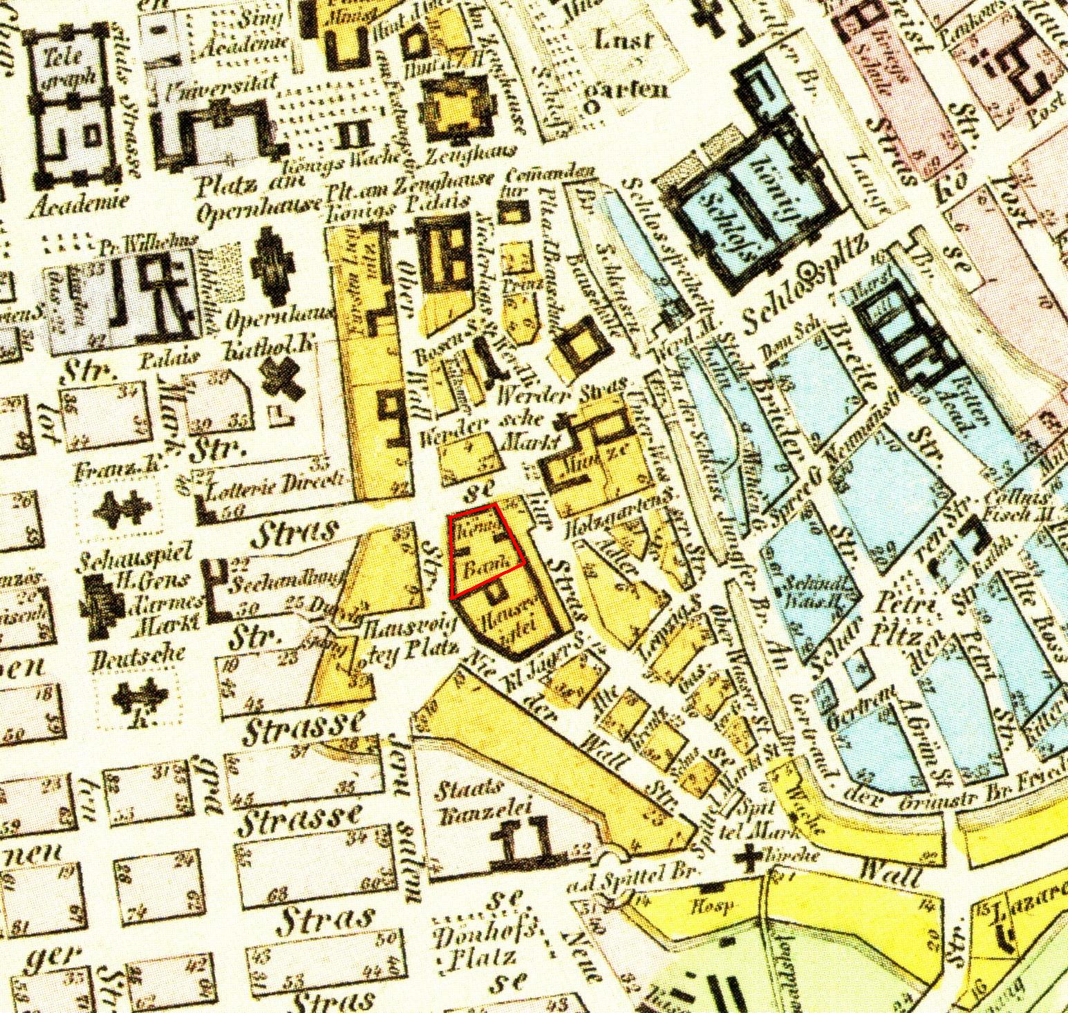 Lage der Königlichen Hauptbank in Berlin, 1847.